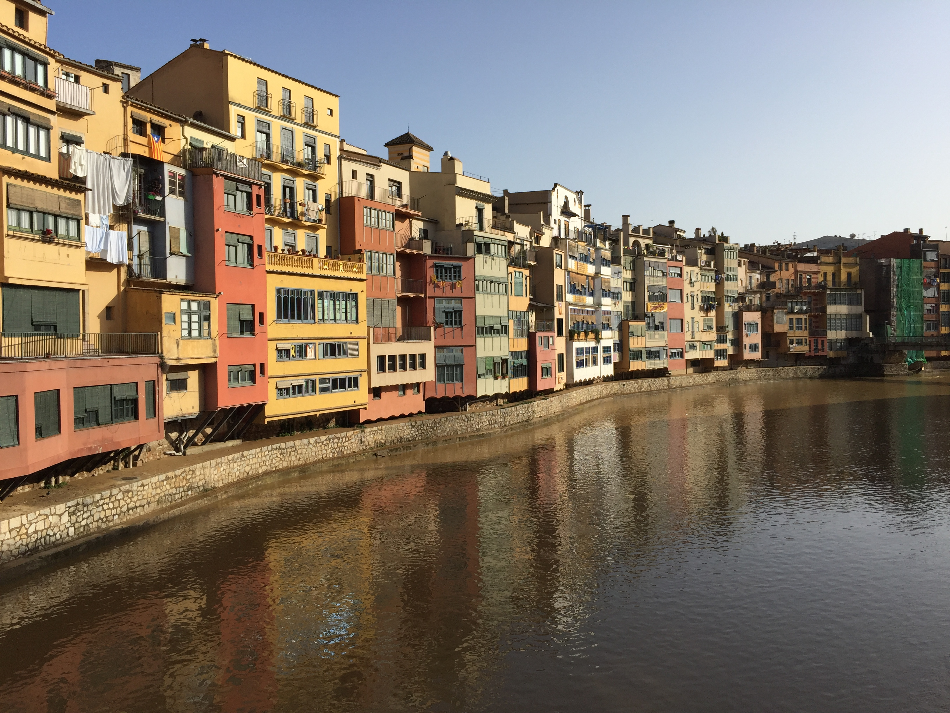 Maisons colorées en bordure du fleuve Onyar.